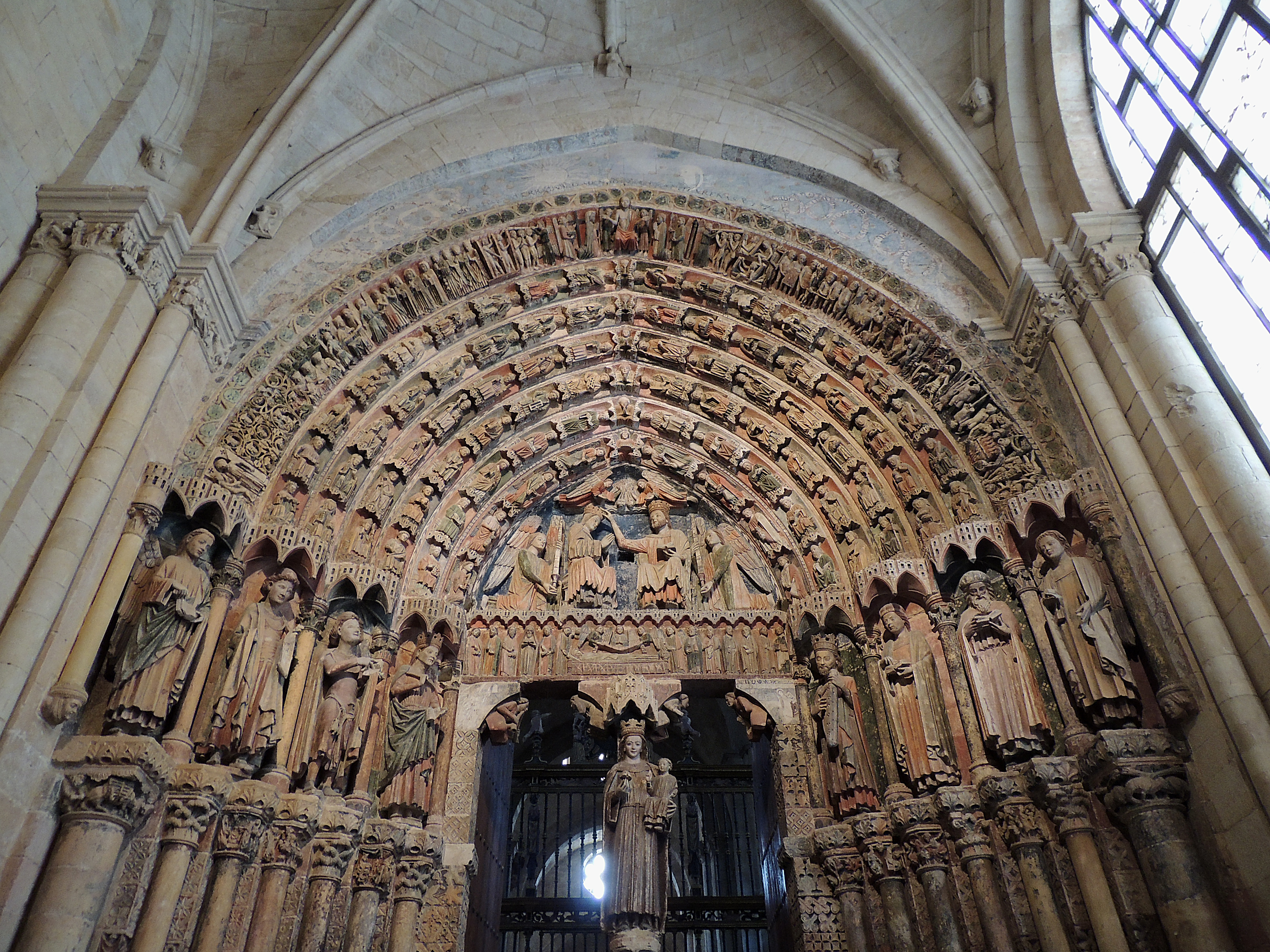 Pórtico de la Majestad de la colegiata de Toro